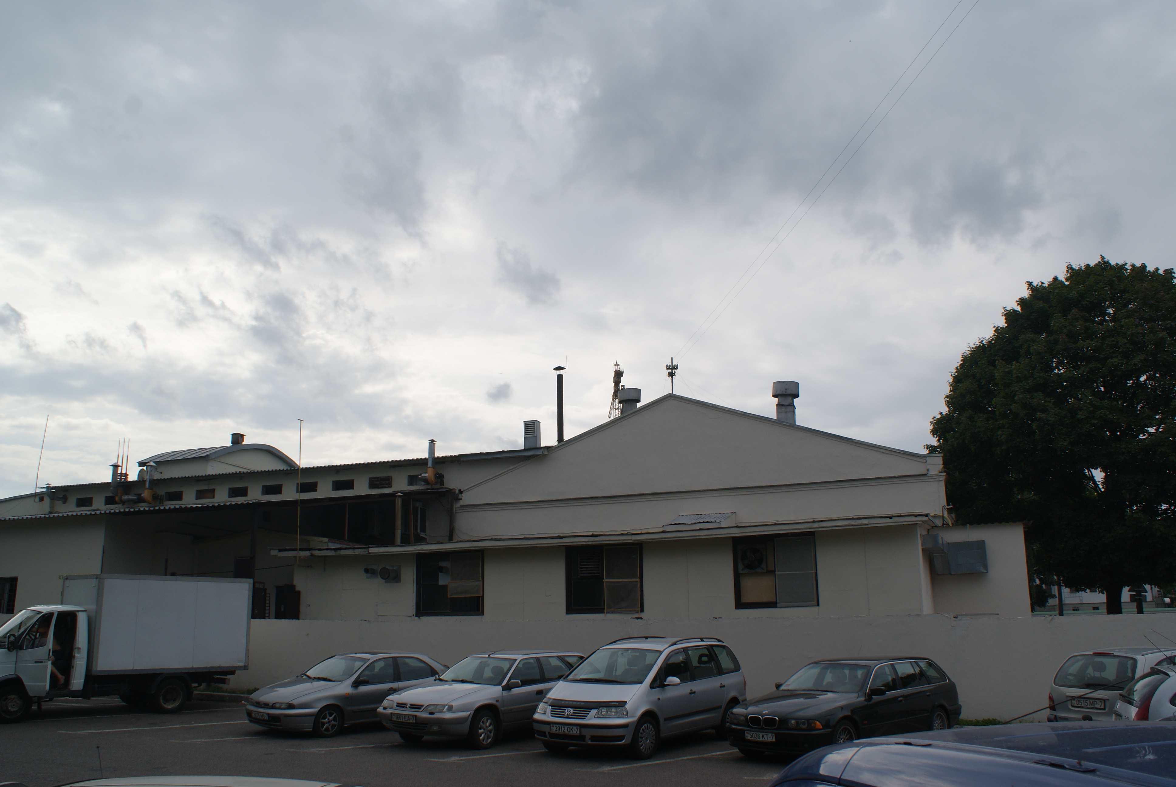 Беларуская (тарашкевіца): Асноўны корпус (з тэхналягічным абсталяваньнем і існуючымі тэхналягічнымі прыбудовамі) хлебазавода. г. Менск This is a photo of Belarusian heritage monument. Reference number: 713Г000087 ( WLM)